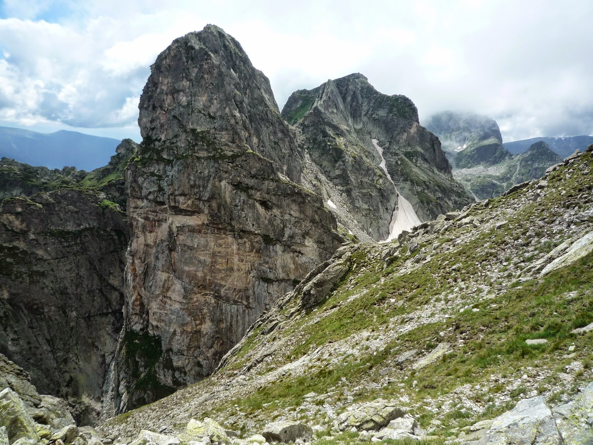 Злия зъб,Орловец и Мальовица